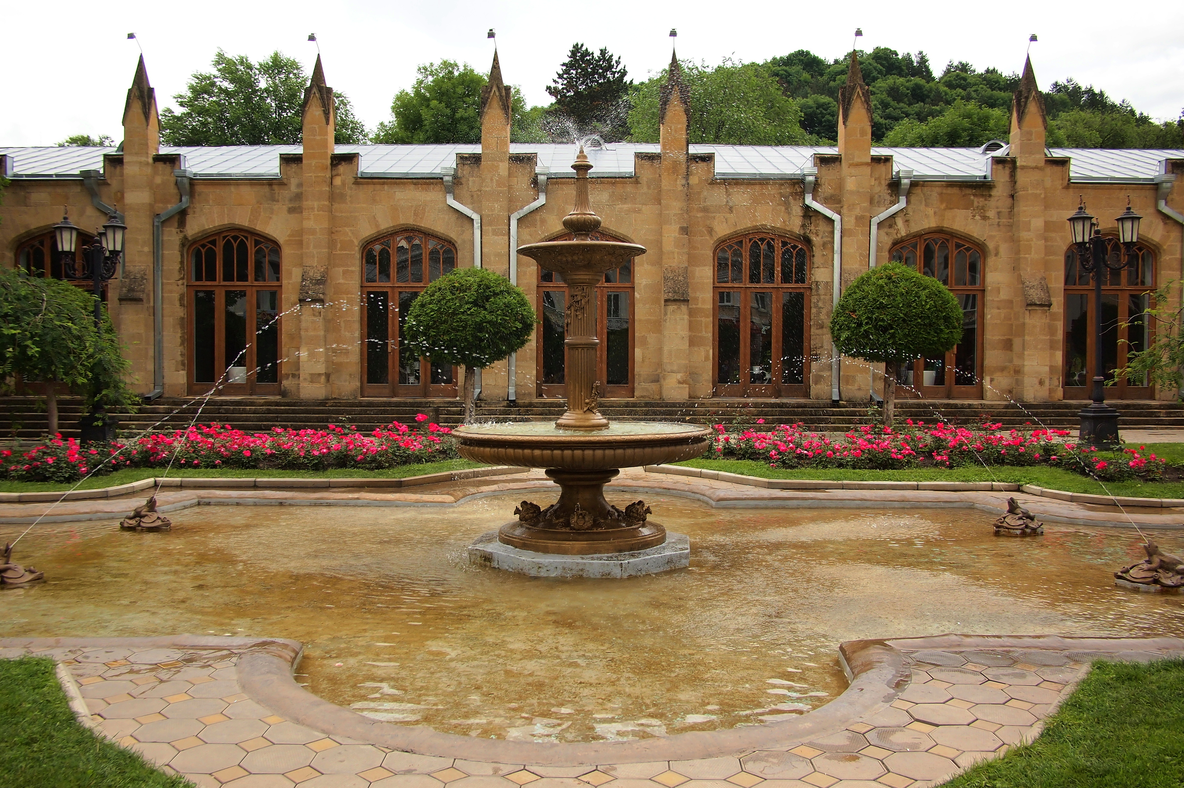 Нарзанная галерея: улица Коминтерна, 2, Кисловодск, Ставропольский край